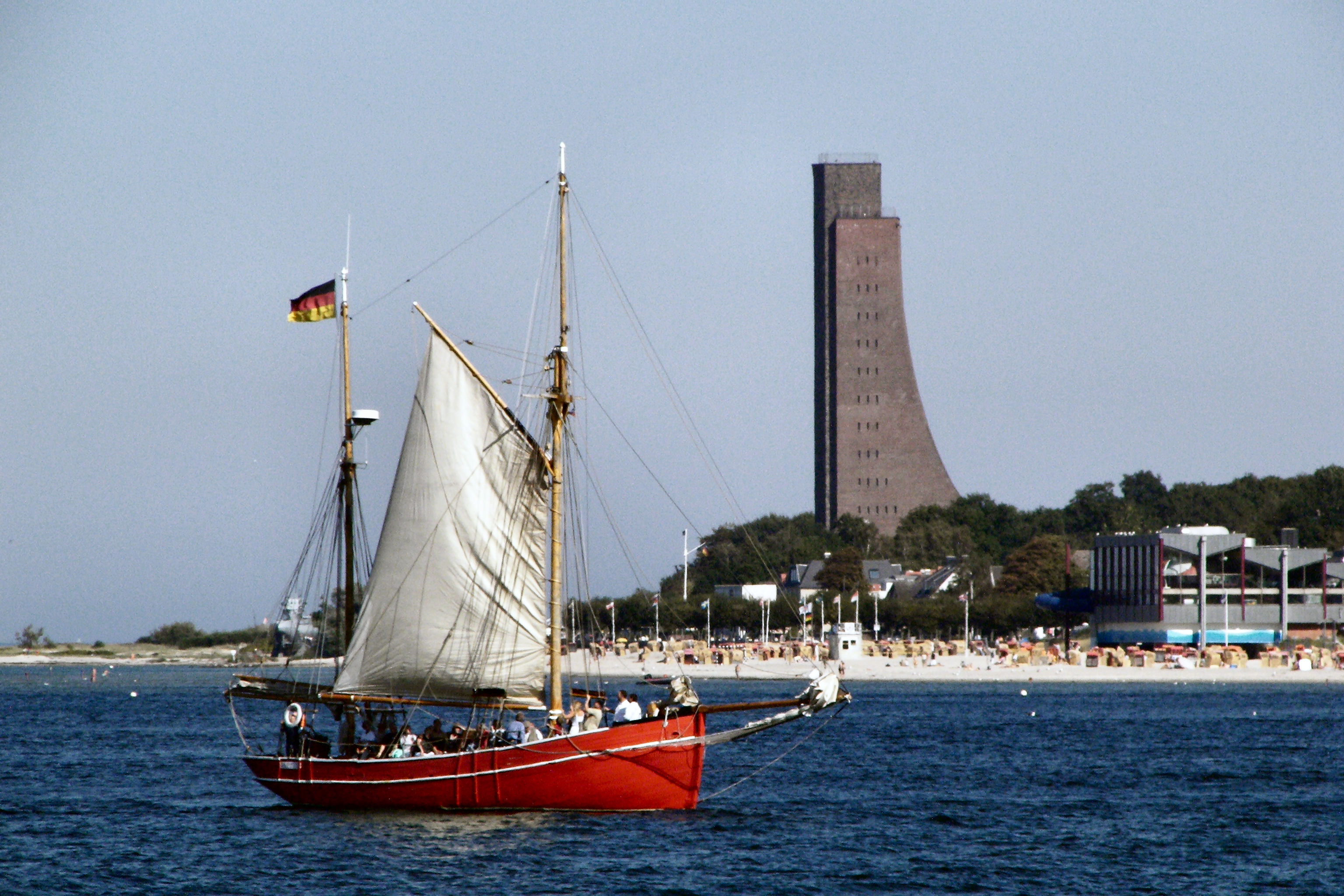 Laboe